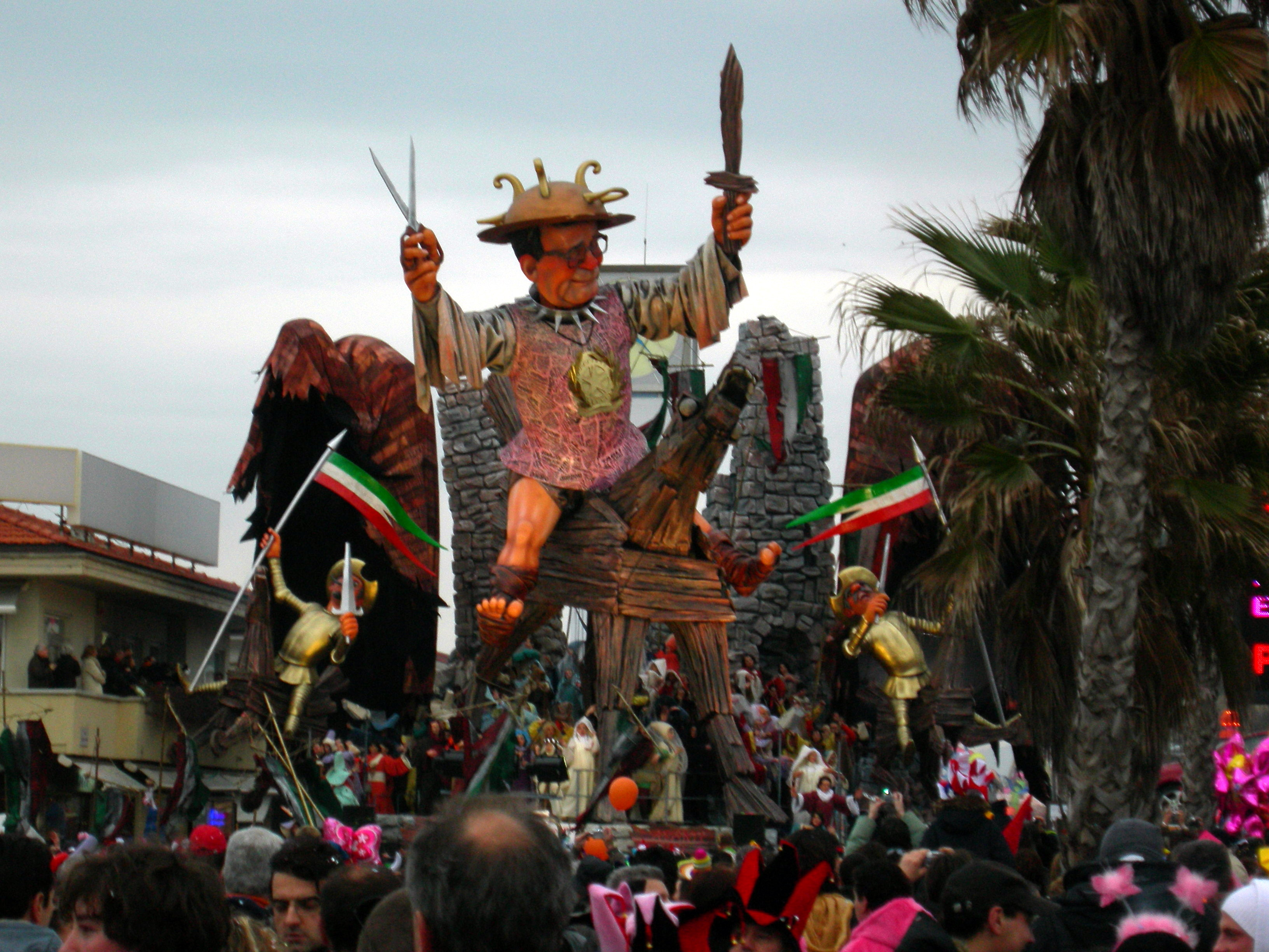 Viareggio Carnival 2007